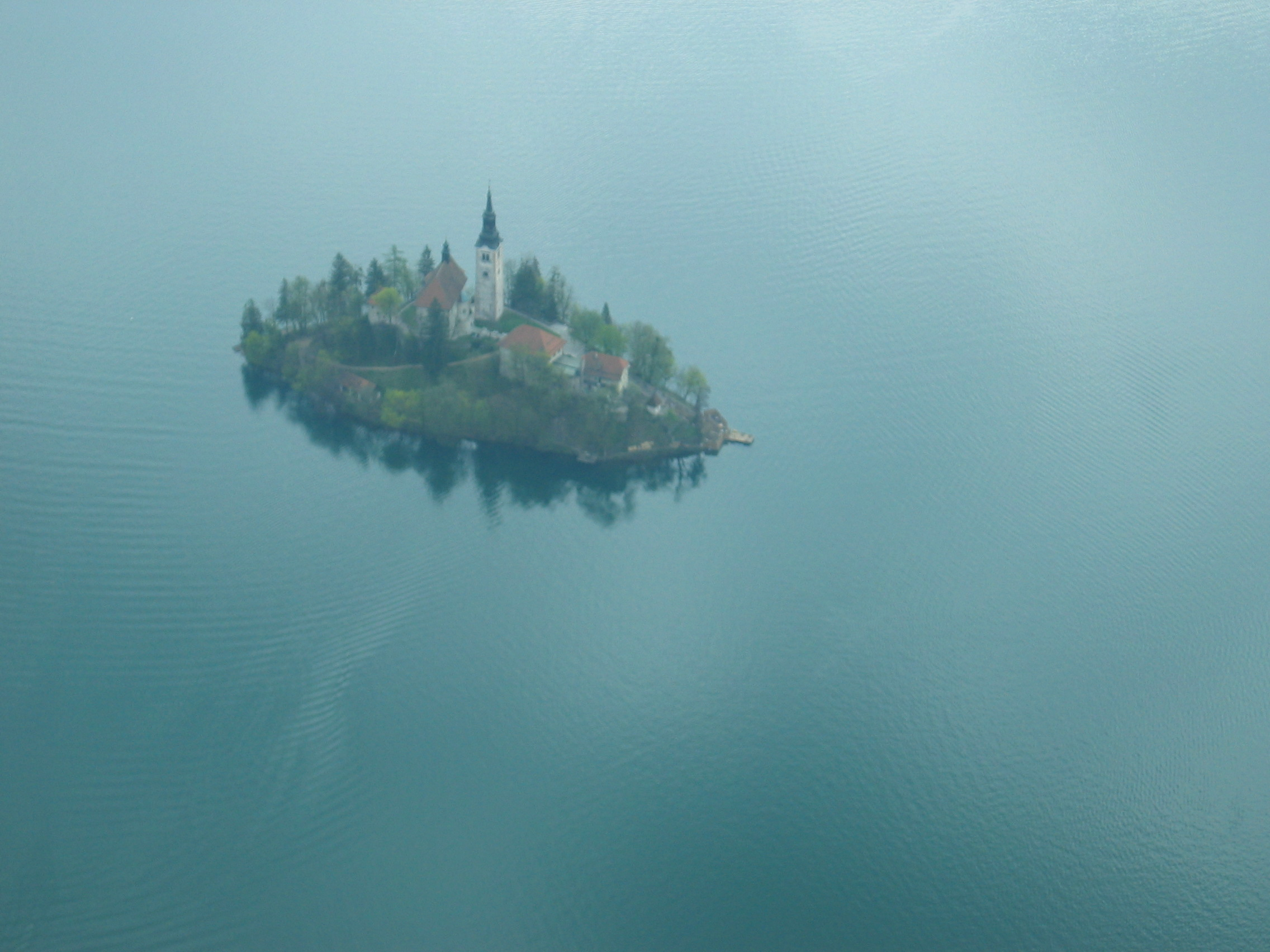 Blejski otok